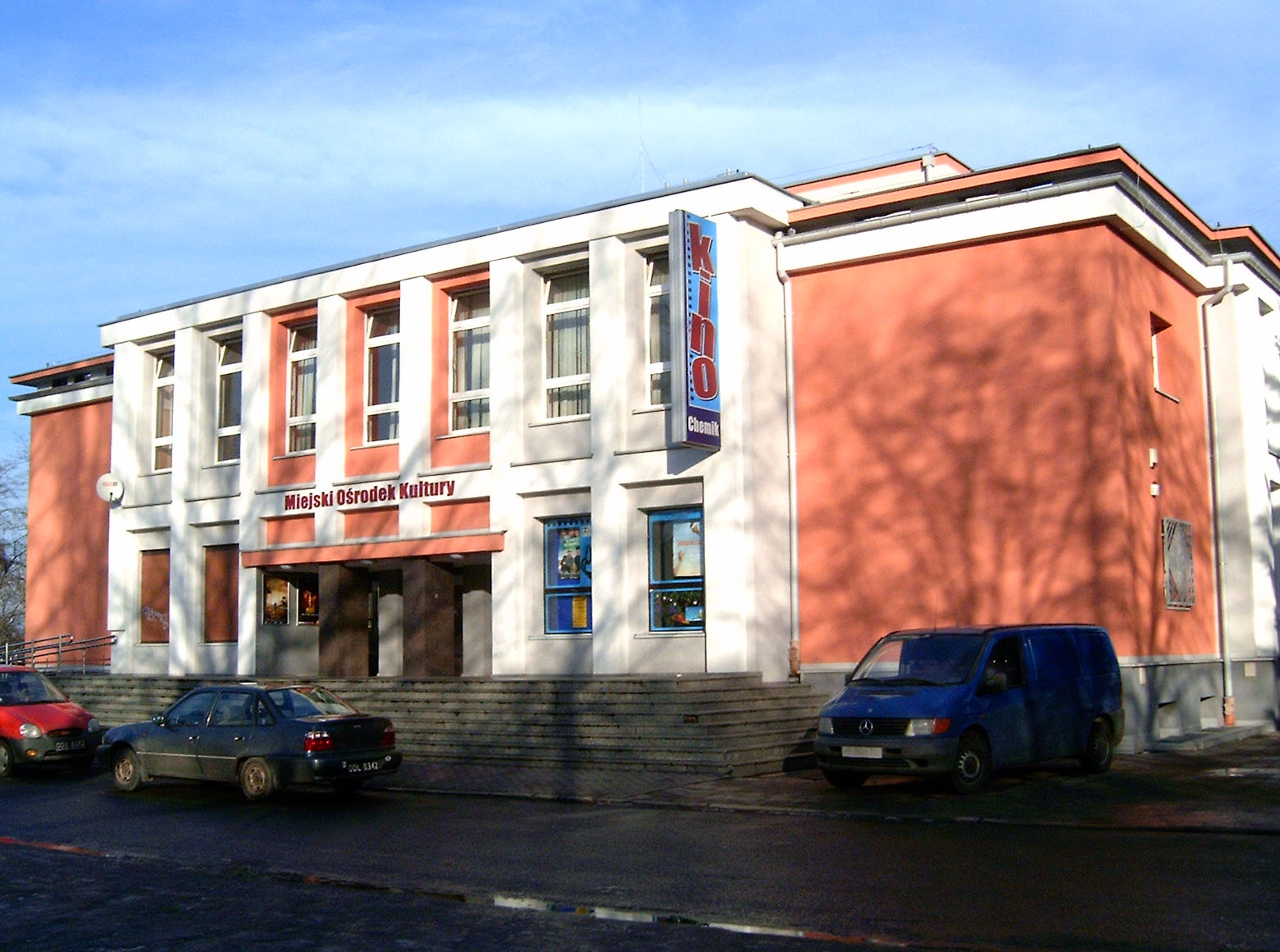 Dom Kultury i Kino "Chemik" - Kędzierzyn-Koźle, woj. opolskie, Polska